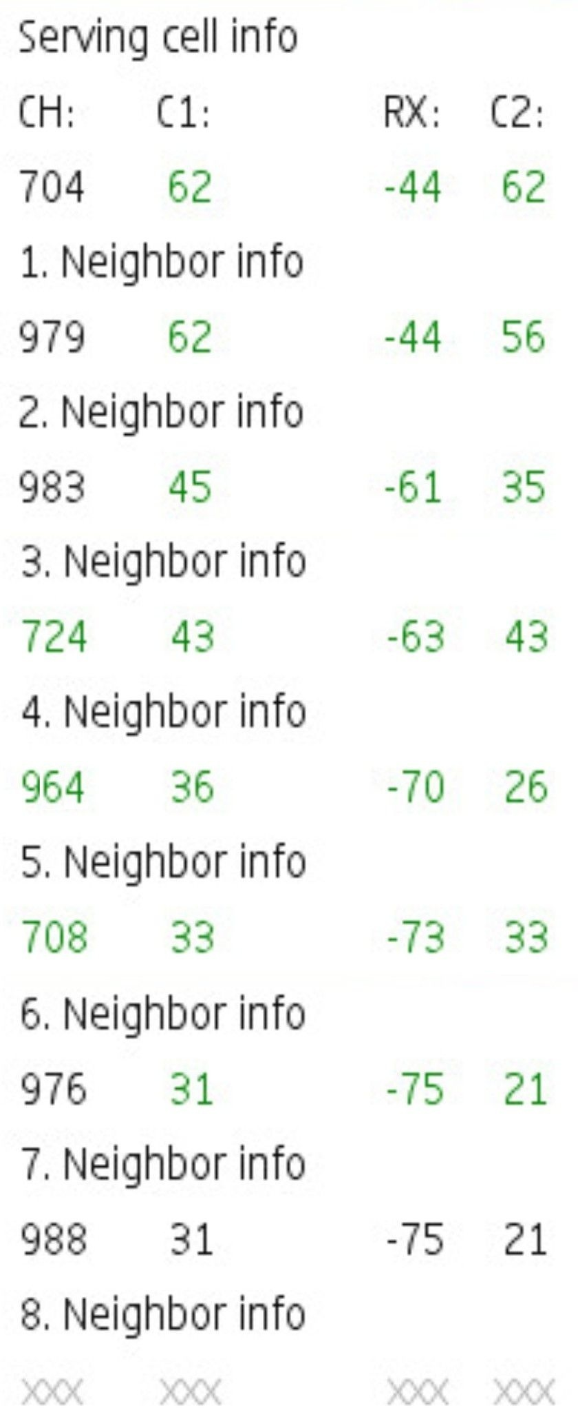 GSM ալիքների ցուցակ Նկարը screenshot է Nokia FieldTest ծրագրից